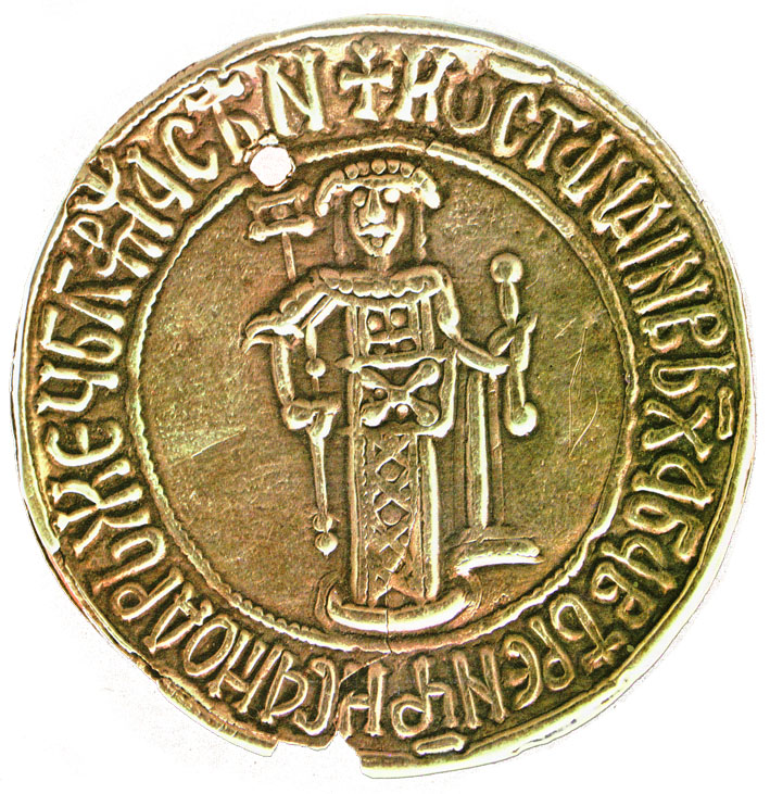 Златен печат на цар Константин Асен. Надпис на български: „+Константин, в Христа Бога верен цар и самодържец на българите, Асен.“